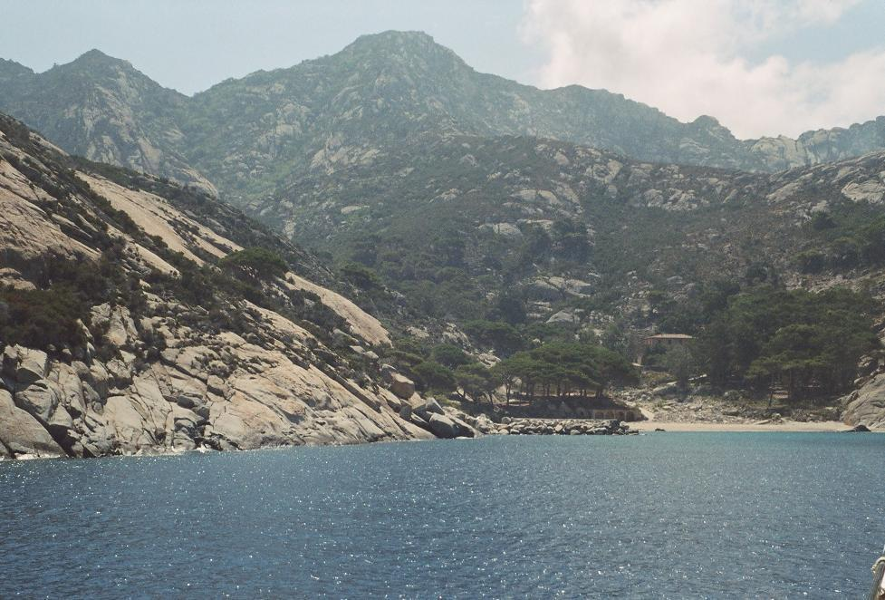 Den italienske ø, Montecristo